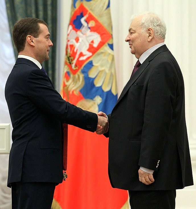 Дмитрий Медведев на церемонии вручения государственных наград. Орденом «За заслуги перед Отечеством» III степени награждён артист Московского академического театра сатиры Михаил Державин